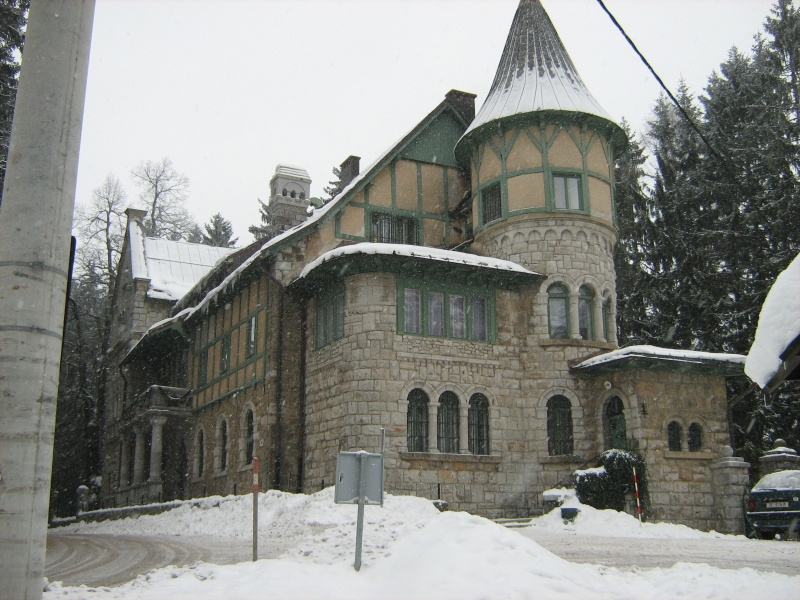 Dvorac u Staroj Sušici